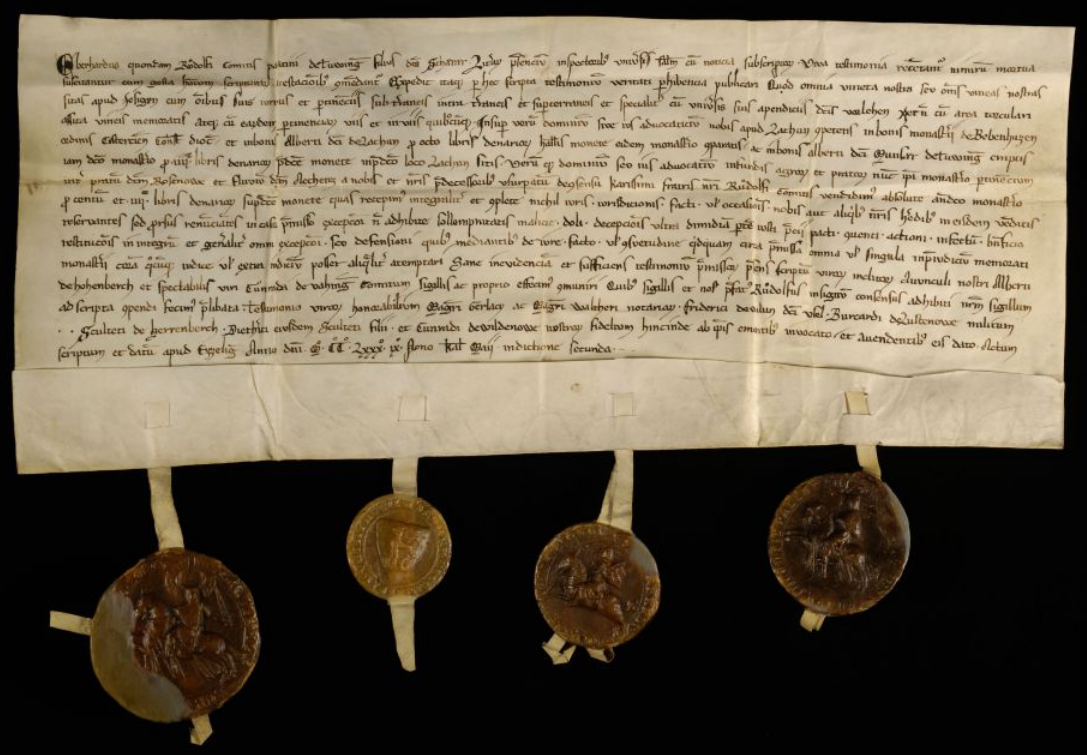 A 474 U 962 Esslingen (Ezzelingen), 1289 April 23 (nono kalendas Maii Indictione secunda) Eberhard, des verstorbenen Pfalzgrafen Rudolf von Tübingen (Tüwingen) Sohn, genannt Schärer, verkauft an das Kloster Bebenhausen um 104 Pfund Heller mit Zustimmung seines Bruders Rudolf alle seine Weingärten bei Jesingen mit allen Rechten und Zugehörden, insbesondere den sogenannten Vorlehen, die Kelterhofstätte nahebei sowie das Eigentums- und Vogteirecht über verschiedene Güter bei Lachen und Äcker und Wiesen zwischen der Rosenau (Rosenowe) und der Echaz (dem Ächenzflüsschen). Pergament - Ausfertigung Aussteller: Tübingen, Eberhard von, genannt Schärer